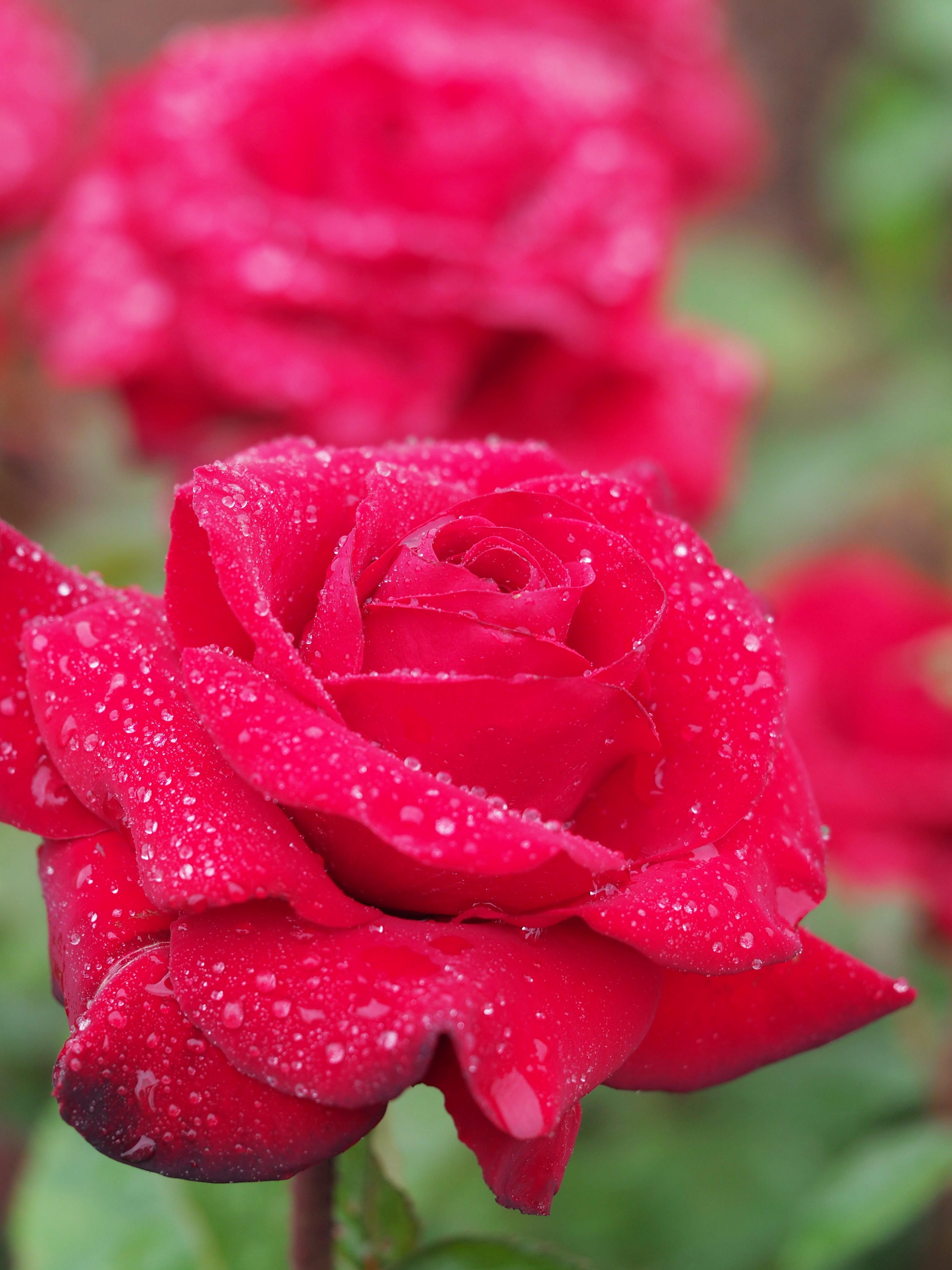 Rose, Red Queen, バラ, レッド クイーン, Hybrid Tea rose ハイブリッドティーローズ Germany ドイツ Kordes 1986